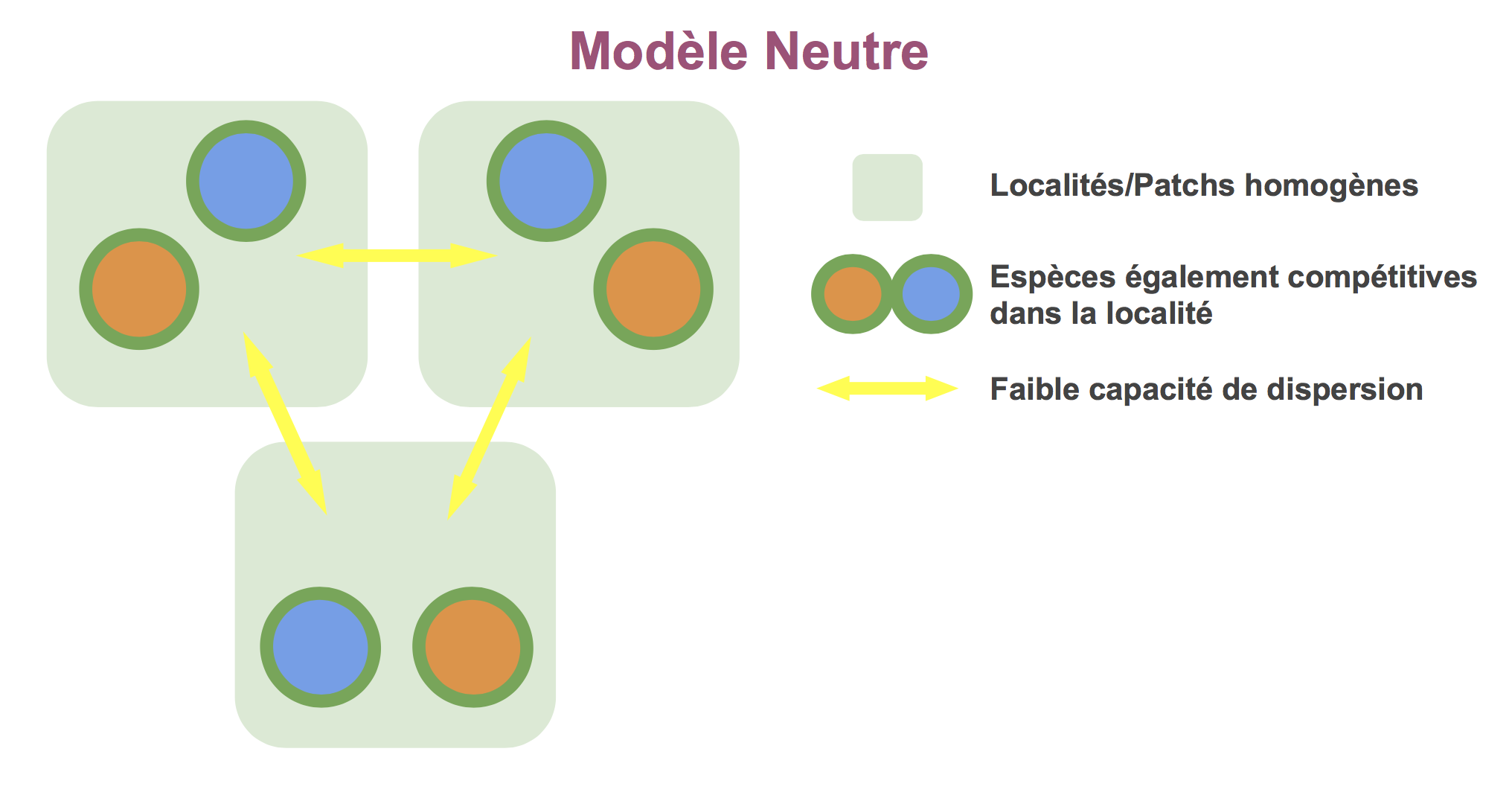 Modele Neutre